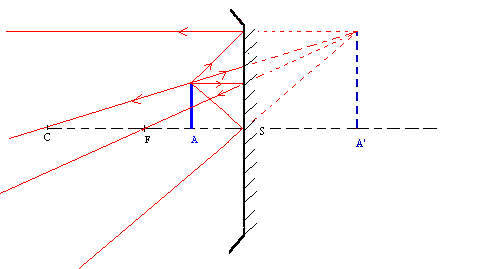 Schéma : image donnée par un miroir concave dans le cas des conditions de Gauss (stigmatisme approché). Cas n°1 (Schéma personnel) Catégorie:Schéma de physique